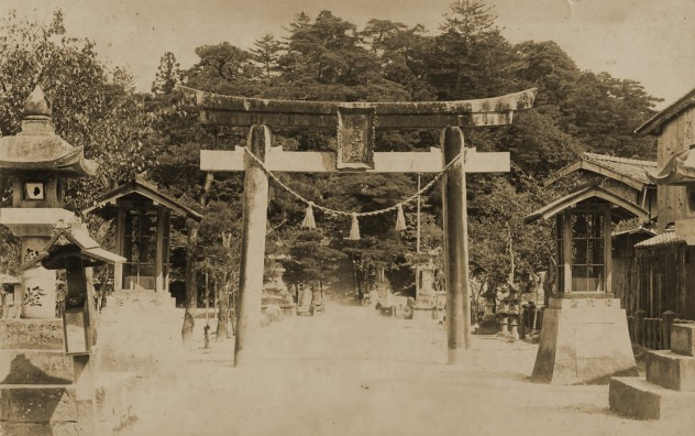 現在の景観とは灯籠などの位置が異なる。